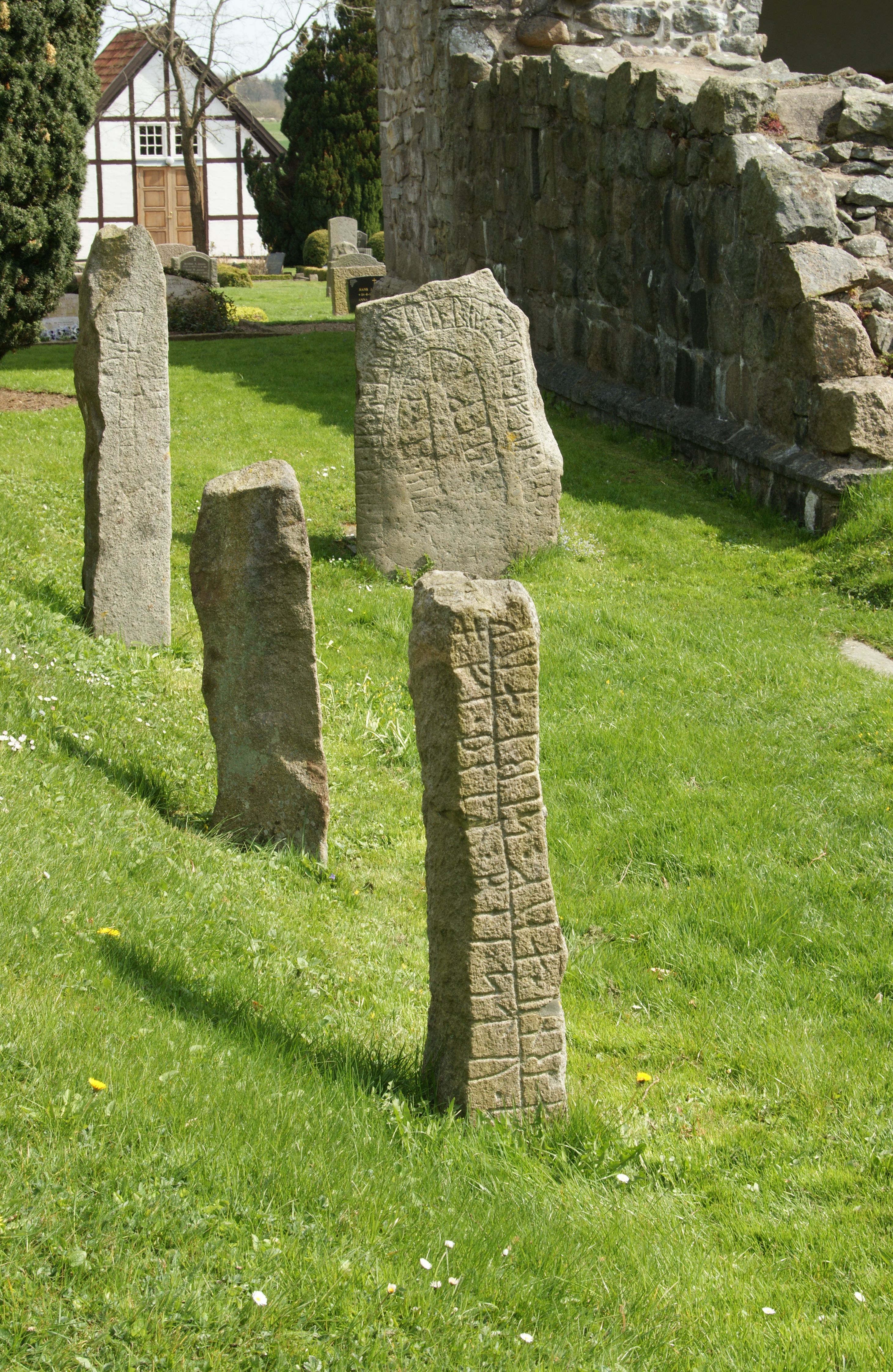 Rune stones - Runesten ved Østermarie Kirke (1025-1125)